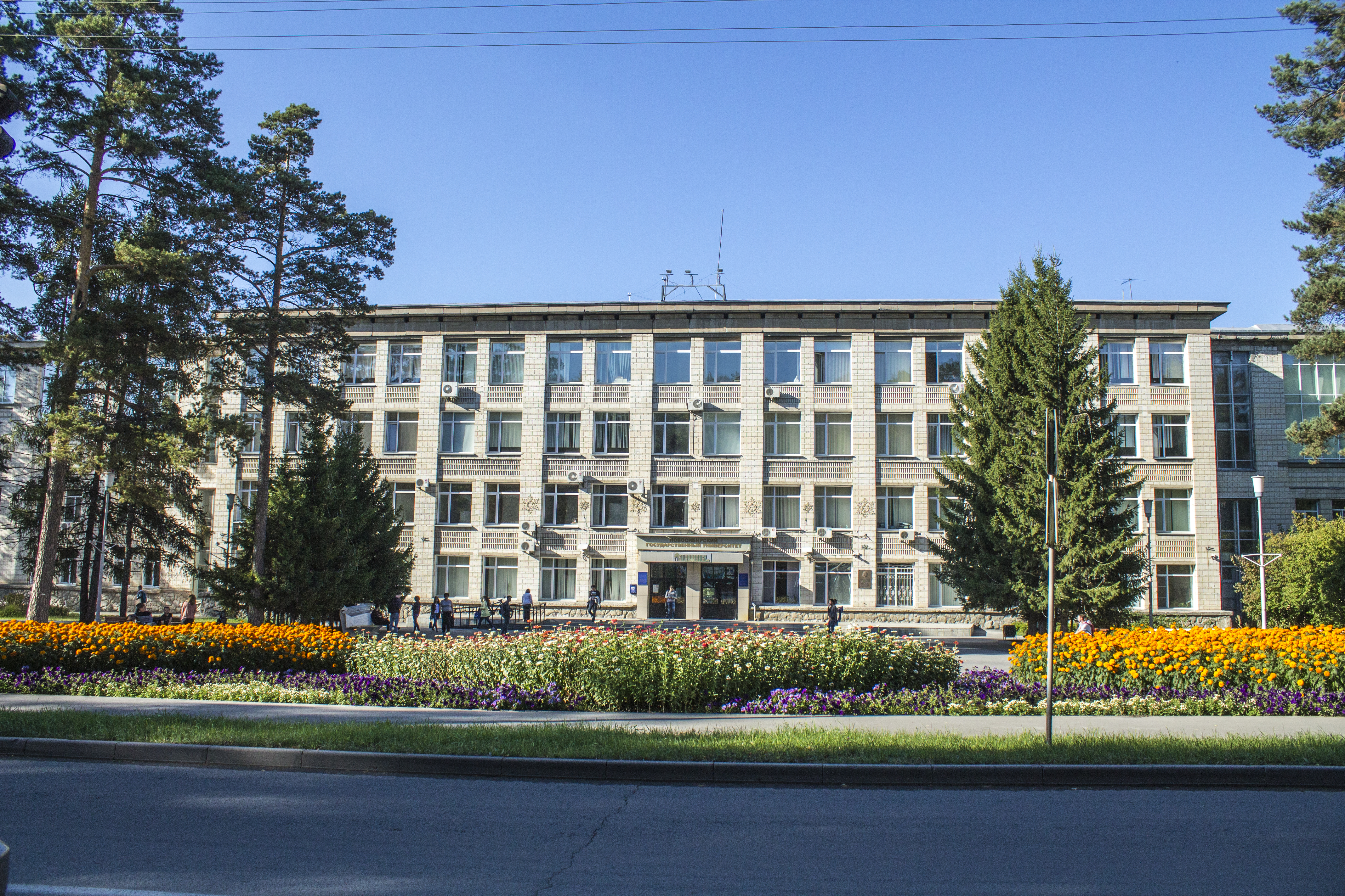 Фасад старого корпуса НГУ